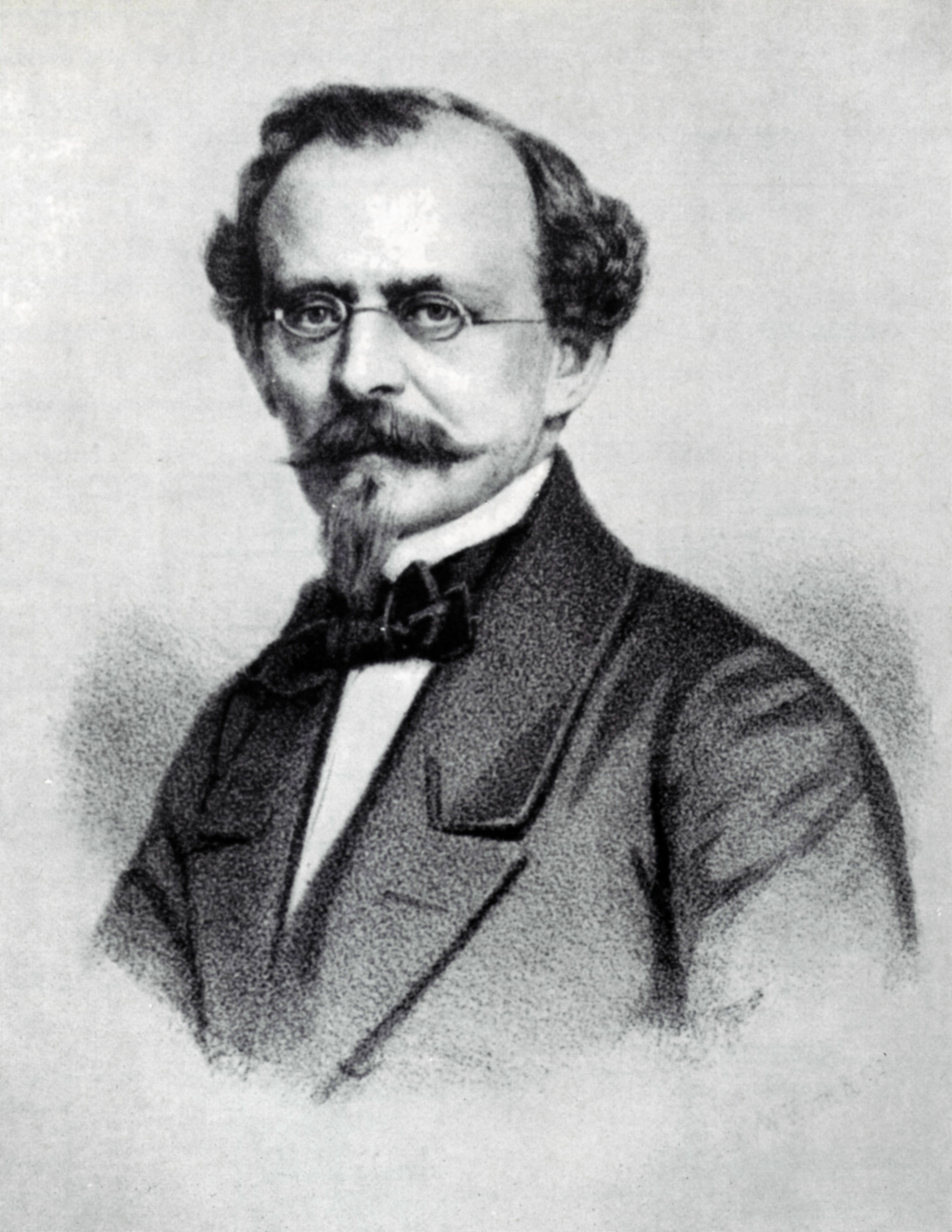 Porträt von Julius Roger.